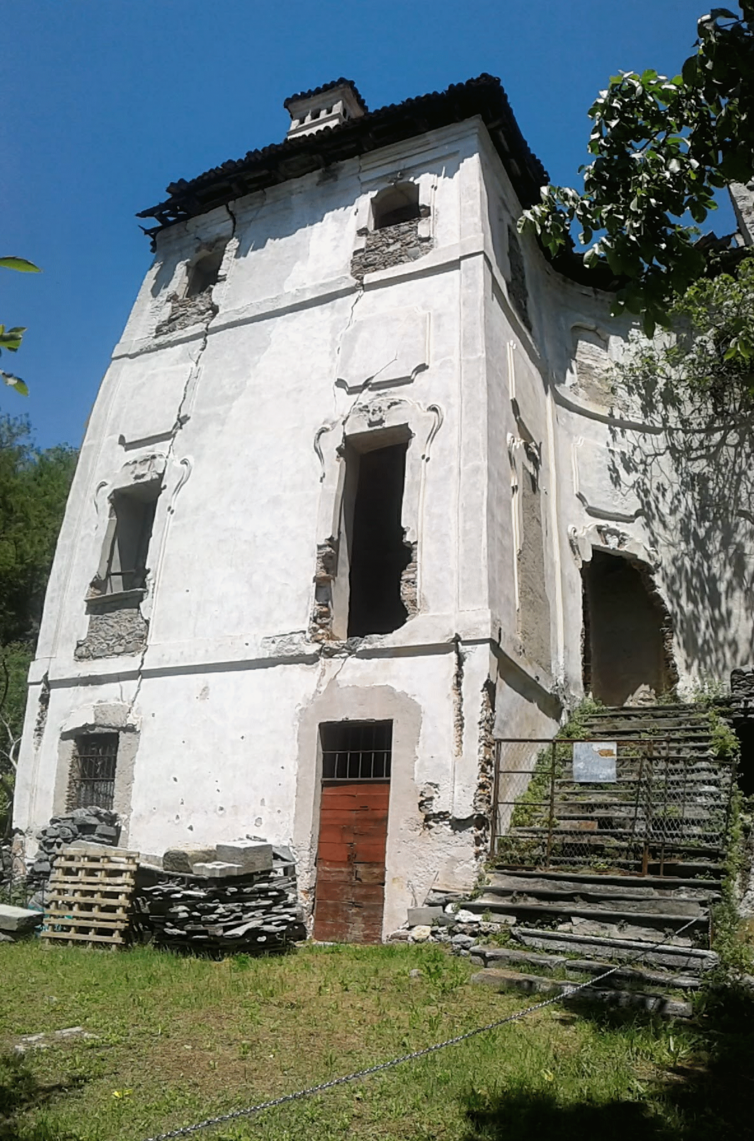 Particolari sugli stucchi in facciata di Villa Giulini